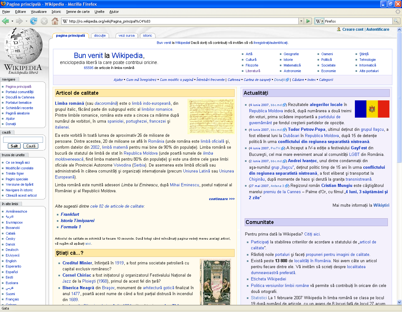 Firefox cu interfața în română